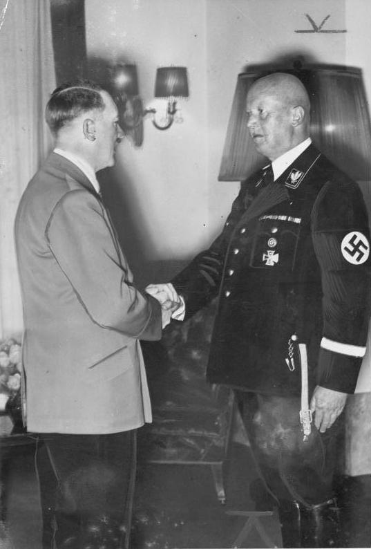 Der Führer beglückwünscht Reichsminister Dr. Lammers zum 60. Geburtstag